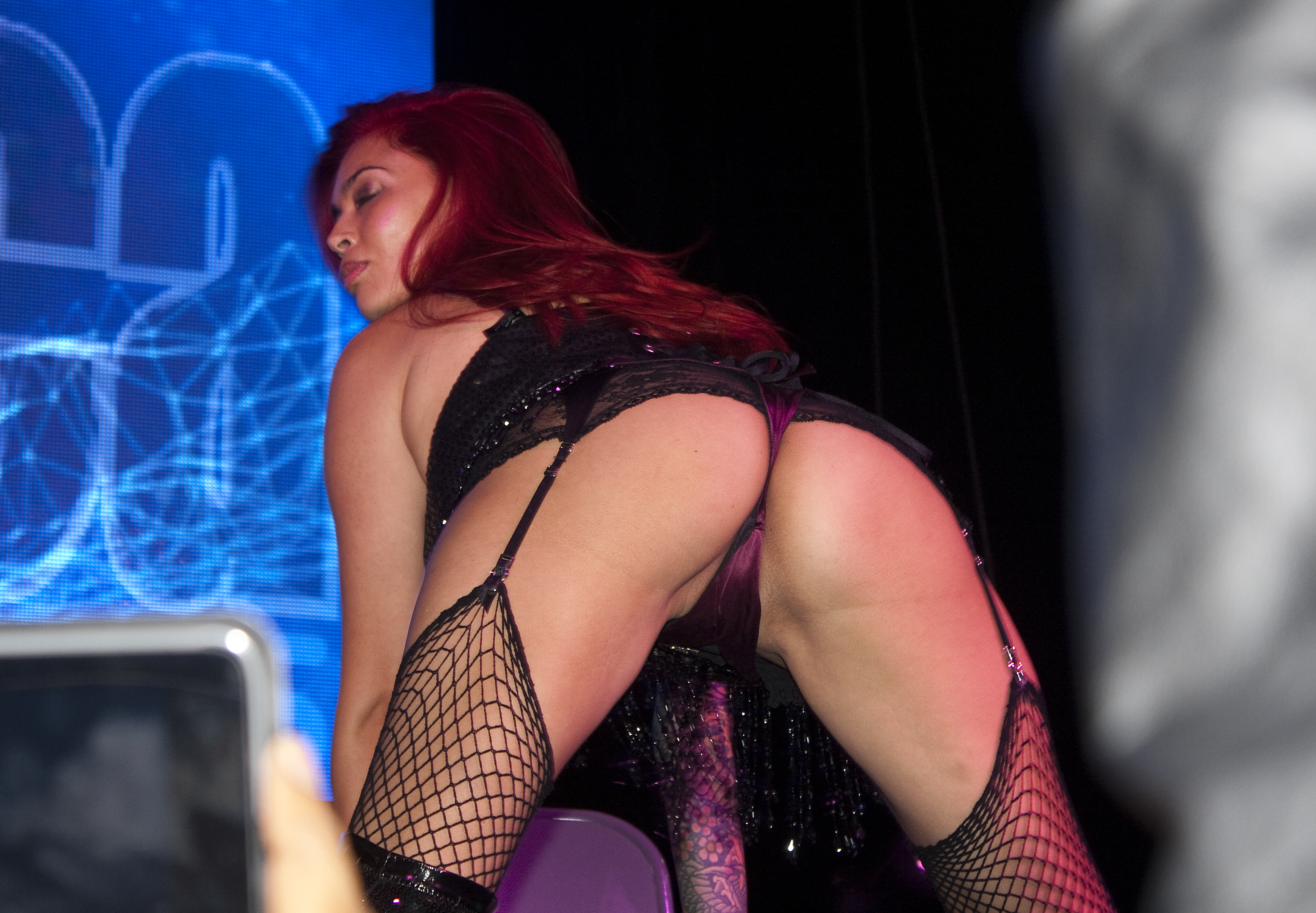 ExxxNJ14_204bas